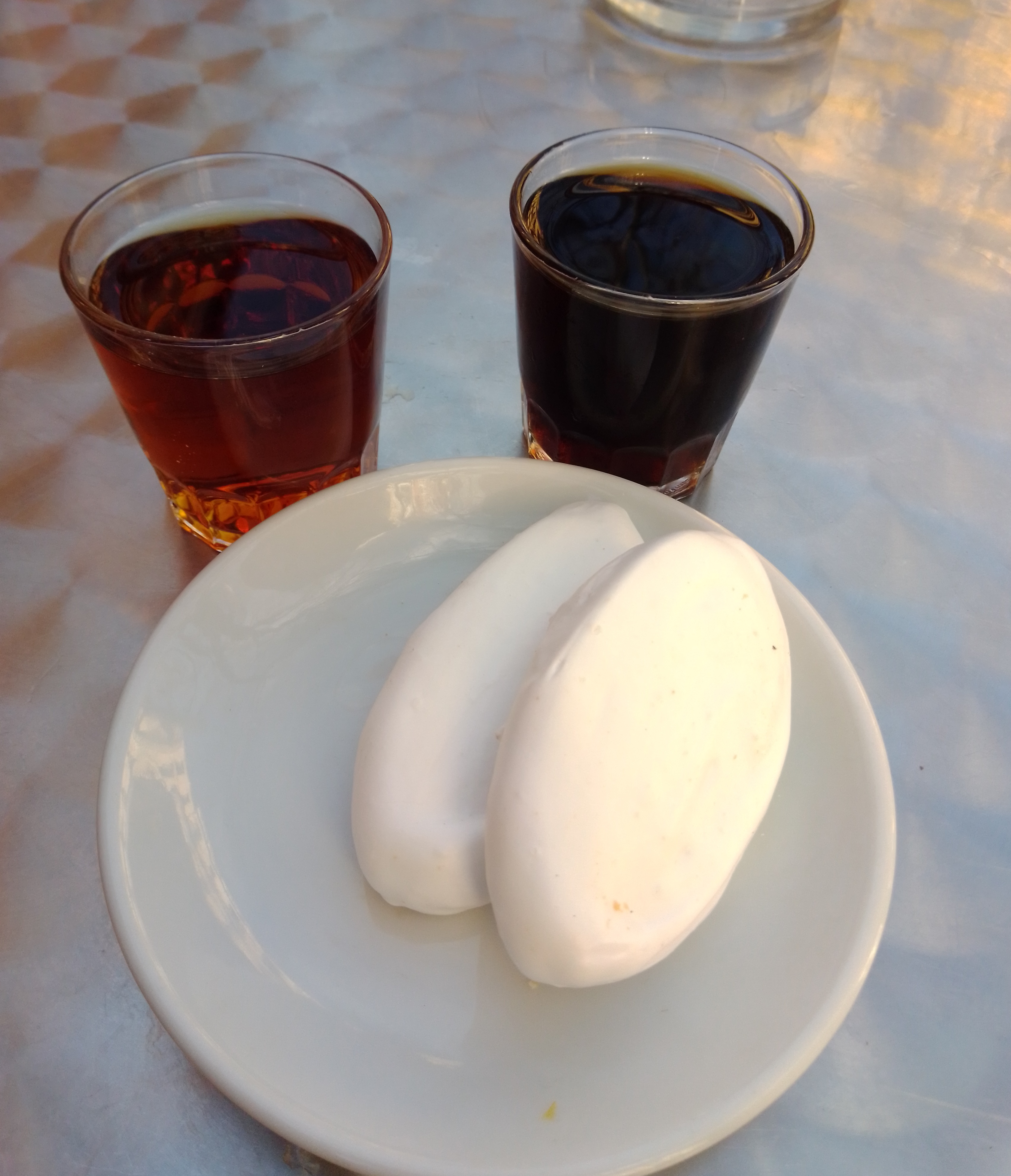 Bar El Penicilino Misa y Penicilino con zapatillas